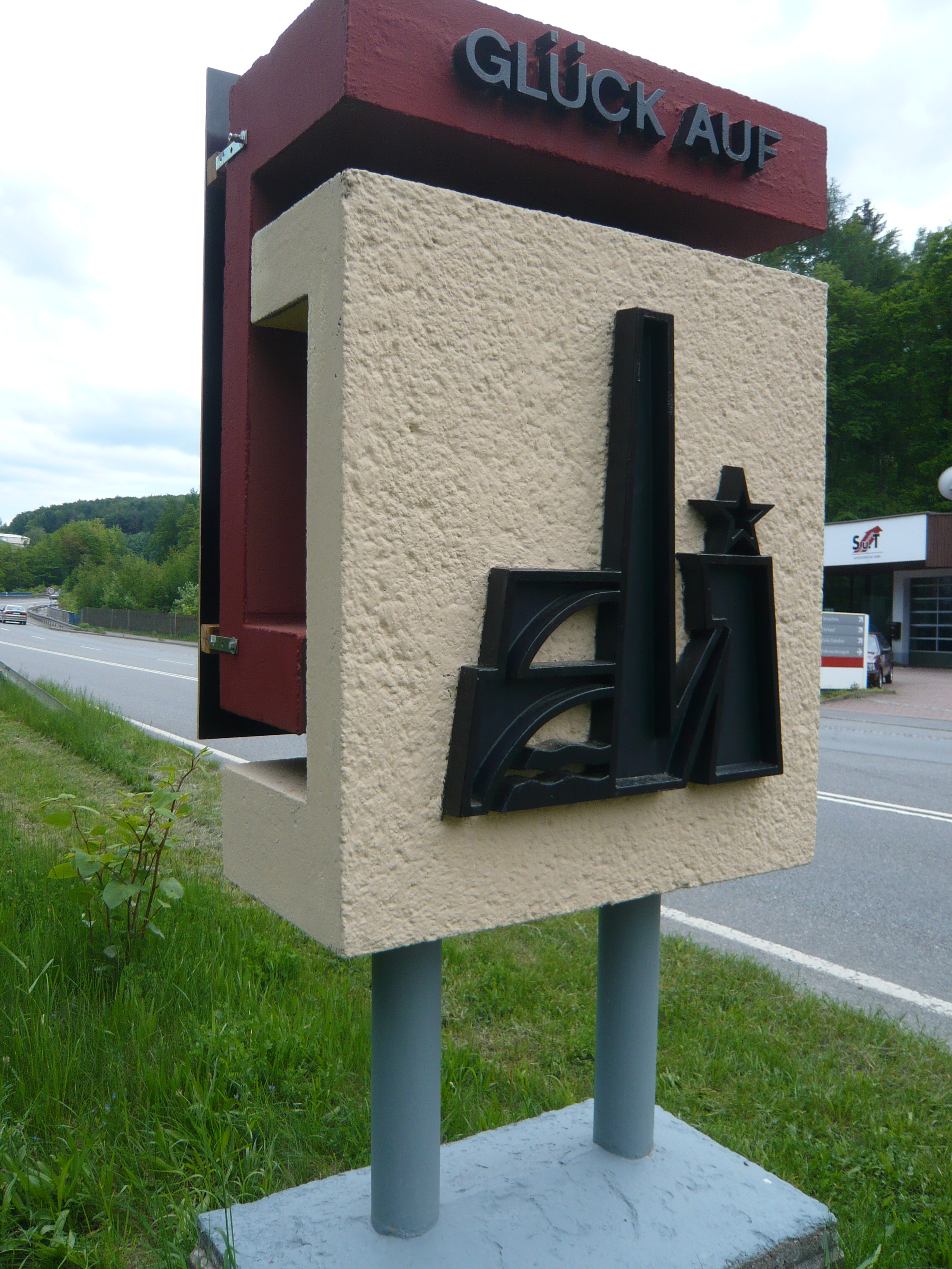 Stadt Aue, Ortseingangsschmuck von 1983